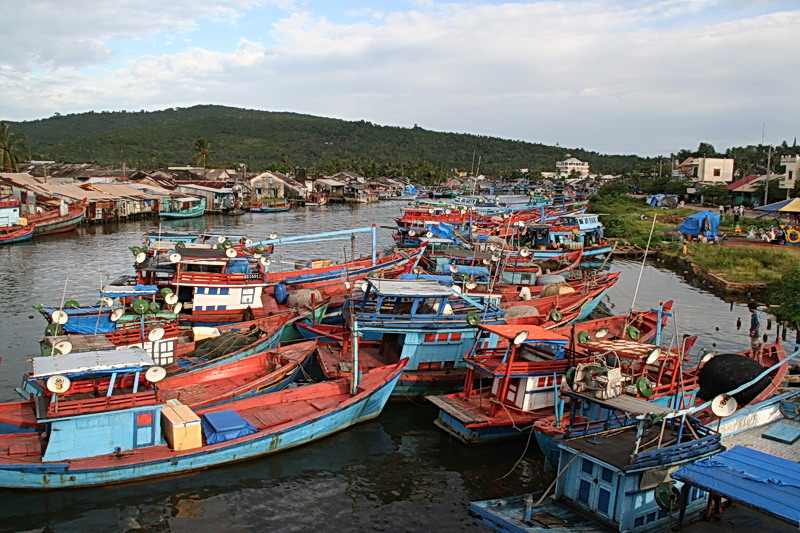 Bateau de pêche